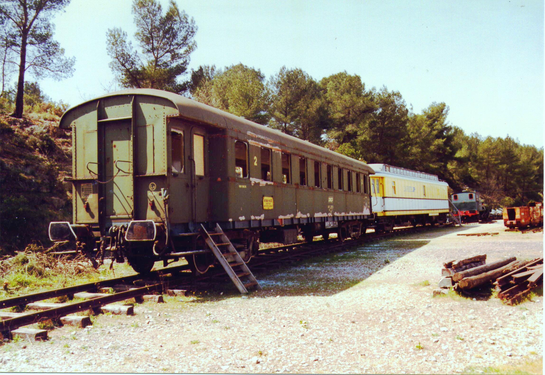 Voiture de voyageurs type Bastille ex réseau DR (Deutsche Reichsbahn ) Photo prise le 14 avril 1996 au Musée des Transports Urbains à la Barque-Fuveau (13)